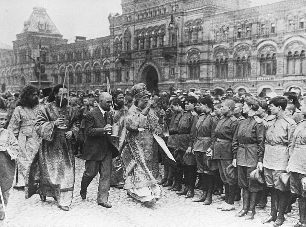 Митрополит московский Тихон Благословляет 2-ой Московский женский батальон смерти, в день вручения иконы от союза Георгиевских кавалеров (фото из журнала "Искры", Иллюстрированный художественно-литературный журнал с карикатурами. Выходит еженедельно при газете «Русское Слово». № 26, Воскресенье, 9 июля 1917 г.)